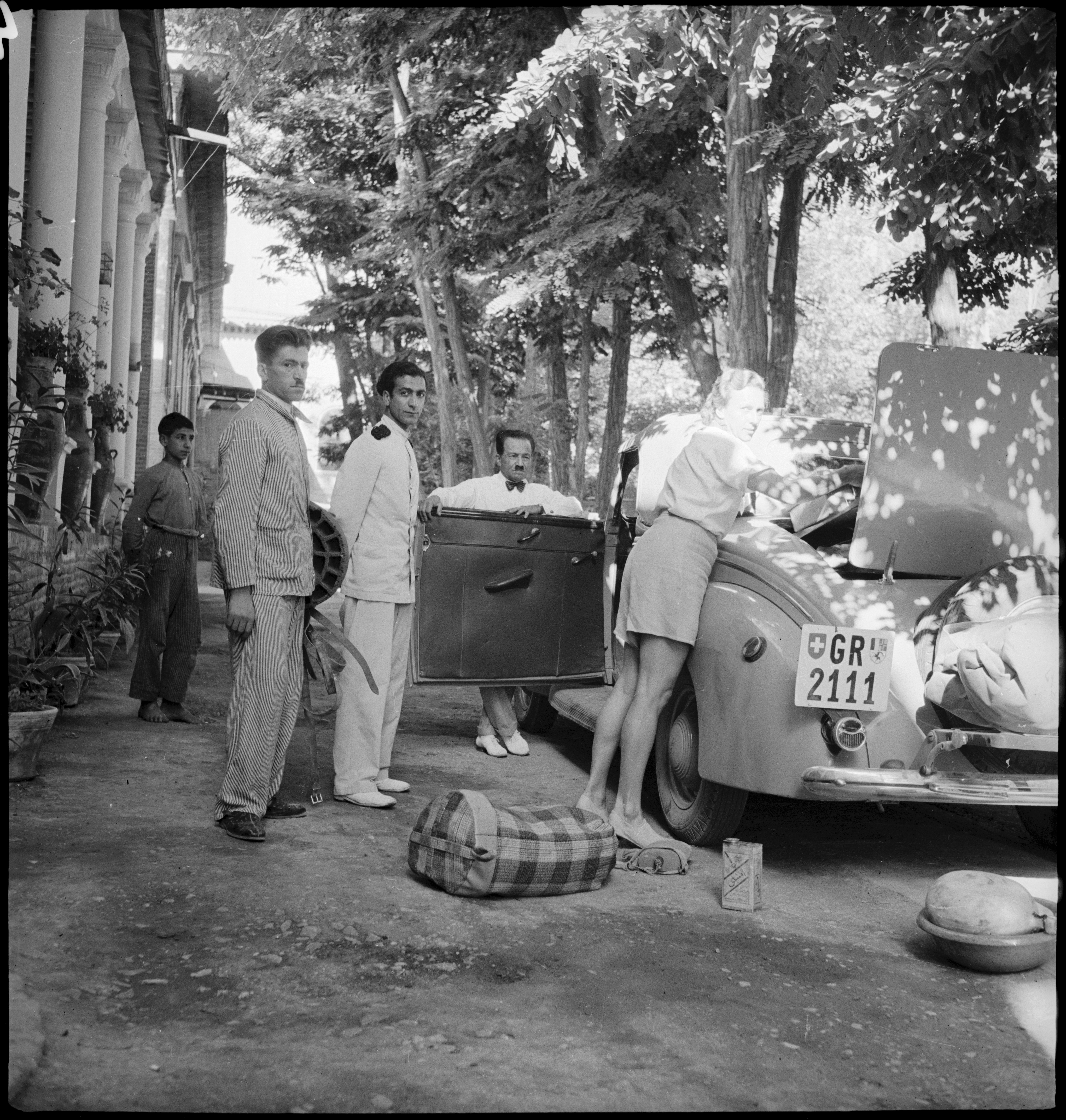 Iran, Meshed (Mashhad): Britisches Konsulat; Ella Maillart beim Beladen des Autos